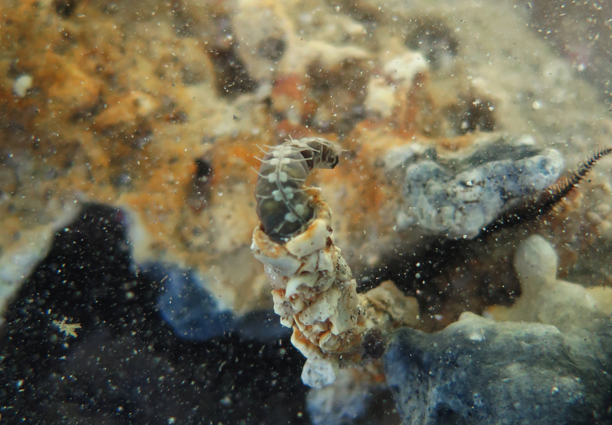 Un ver Spiochaetopterus sp. à la Réunion (dét. Pierre Noël).